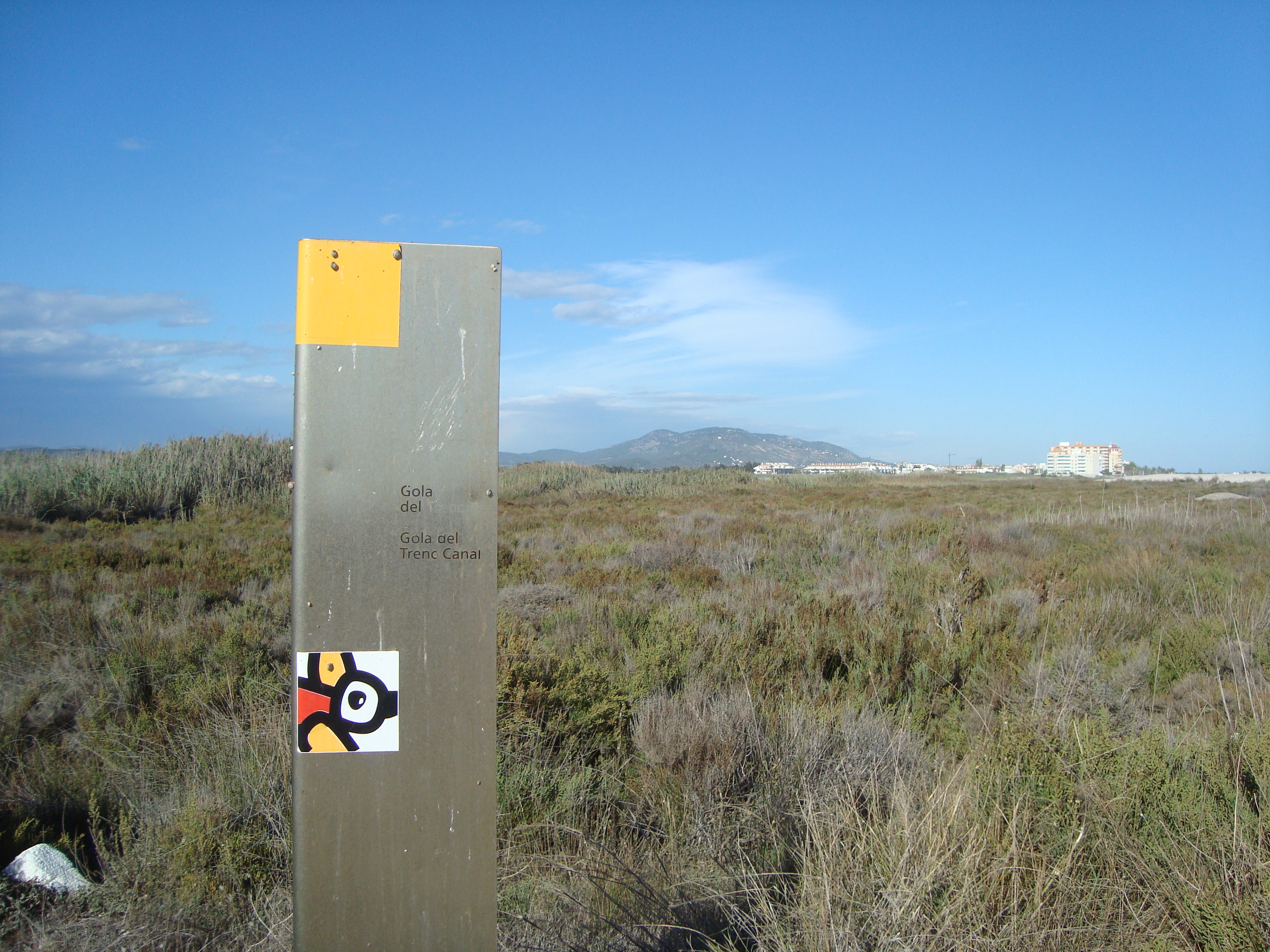 Parque Natural del "Prat de Cabanes i Torreblanca" .